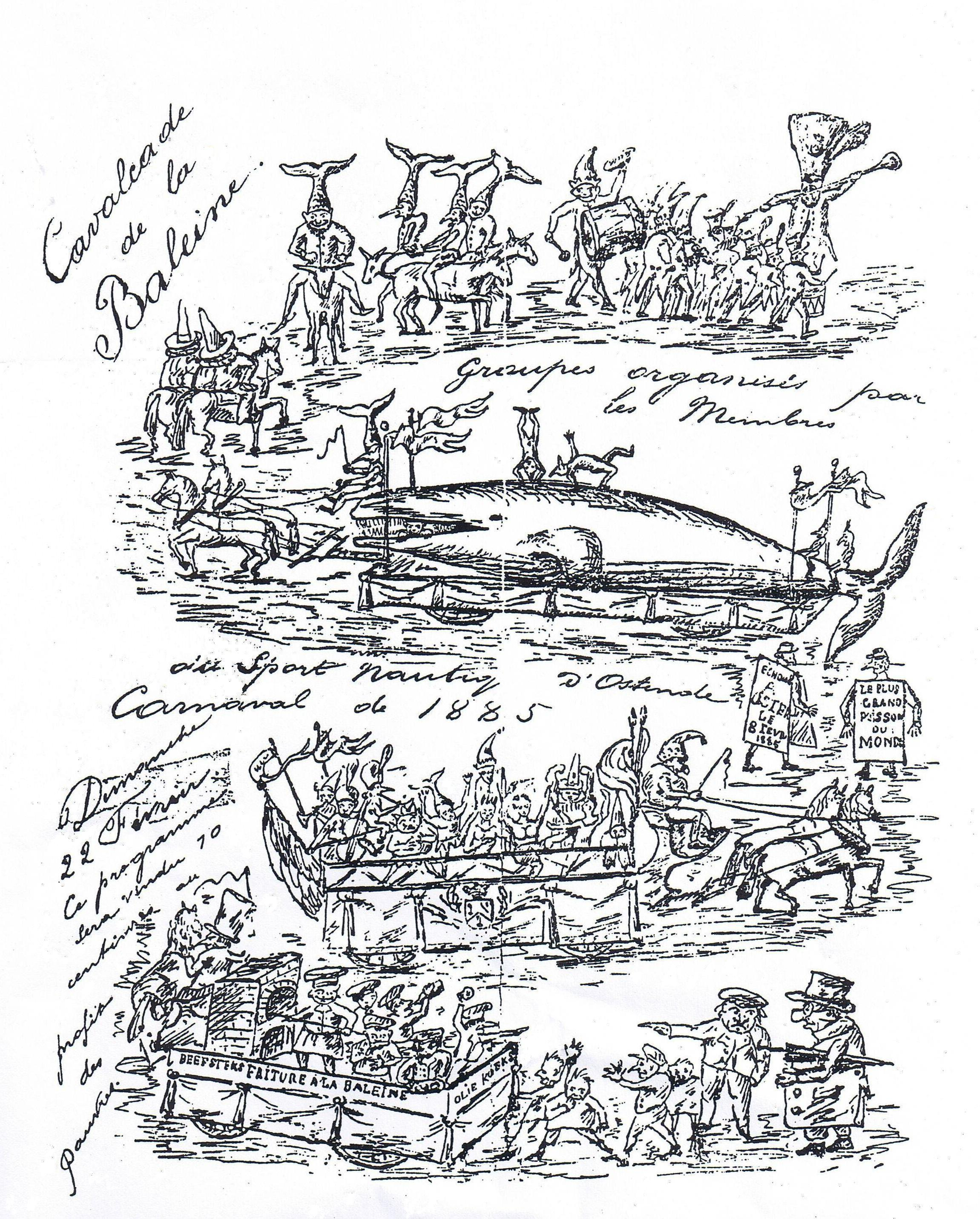 Cavalcade de la Baleine, groupes organisés par les membres du Sport Nautique d'Ostende au Carnaval de cette ville le dimanche 22 février 1885, programme destiné à être vendu 10 centimes au profit des pauvres. Image déjà présente sur Commons et ici nettoyée de quantité de taches. Une première version un rien moins nettoyée a été versée sur Commons avant celle-ci.